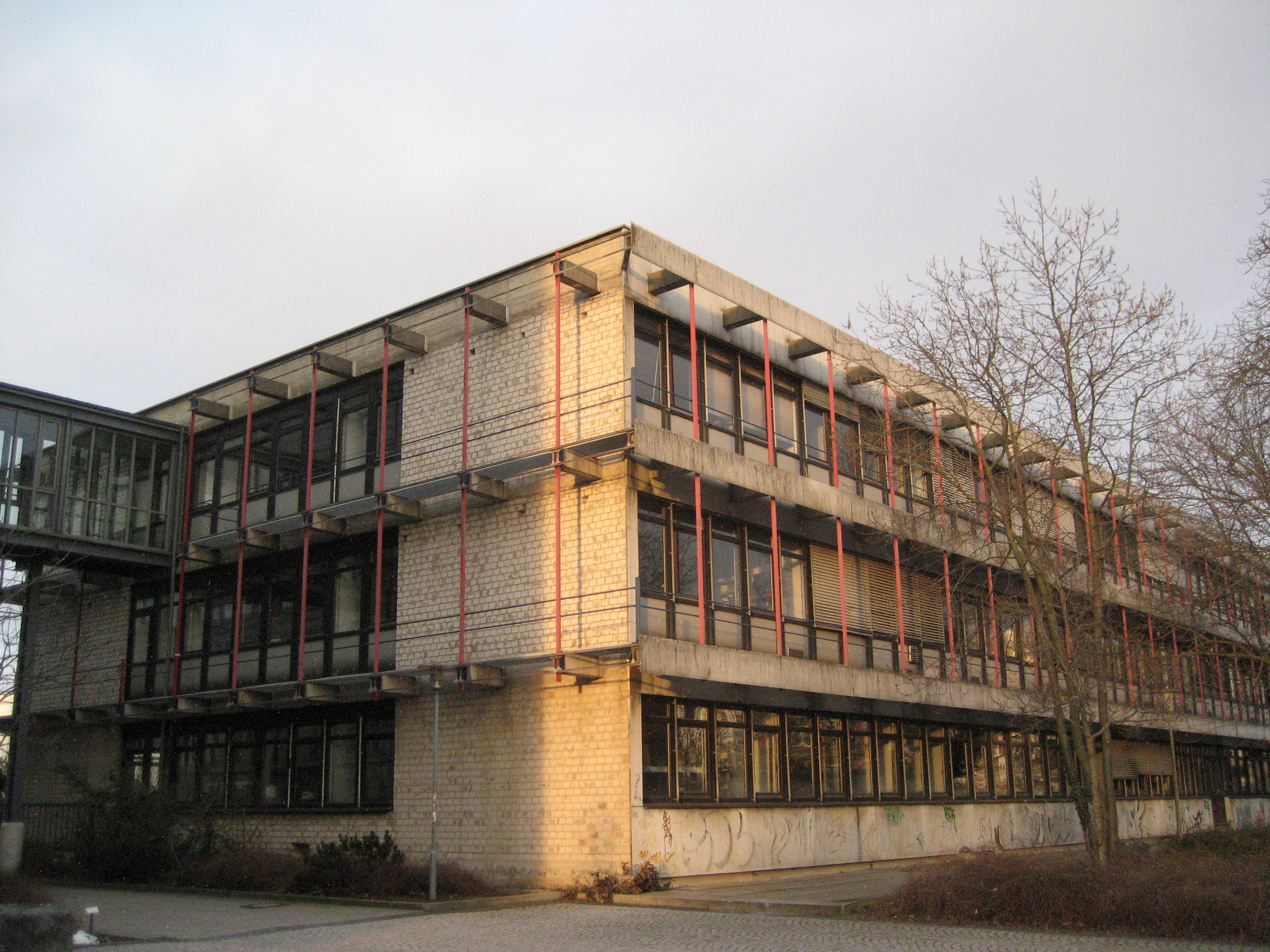 Was vonner Uni...